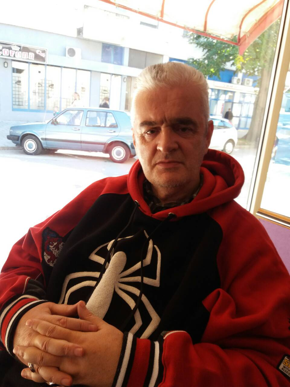 Slika Jasminka u Stocu; 2017 godina.